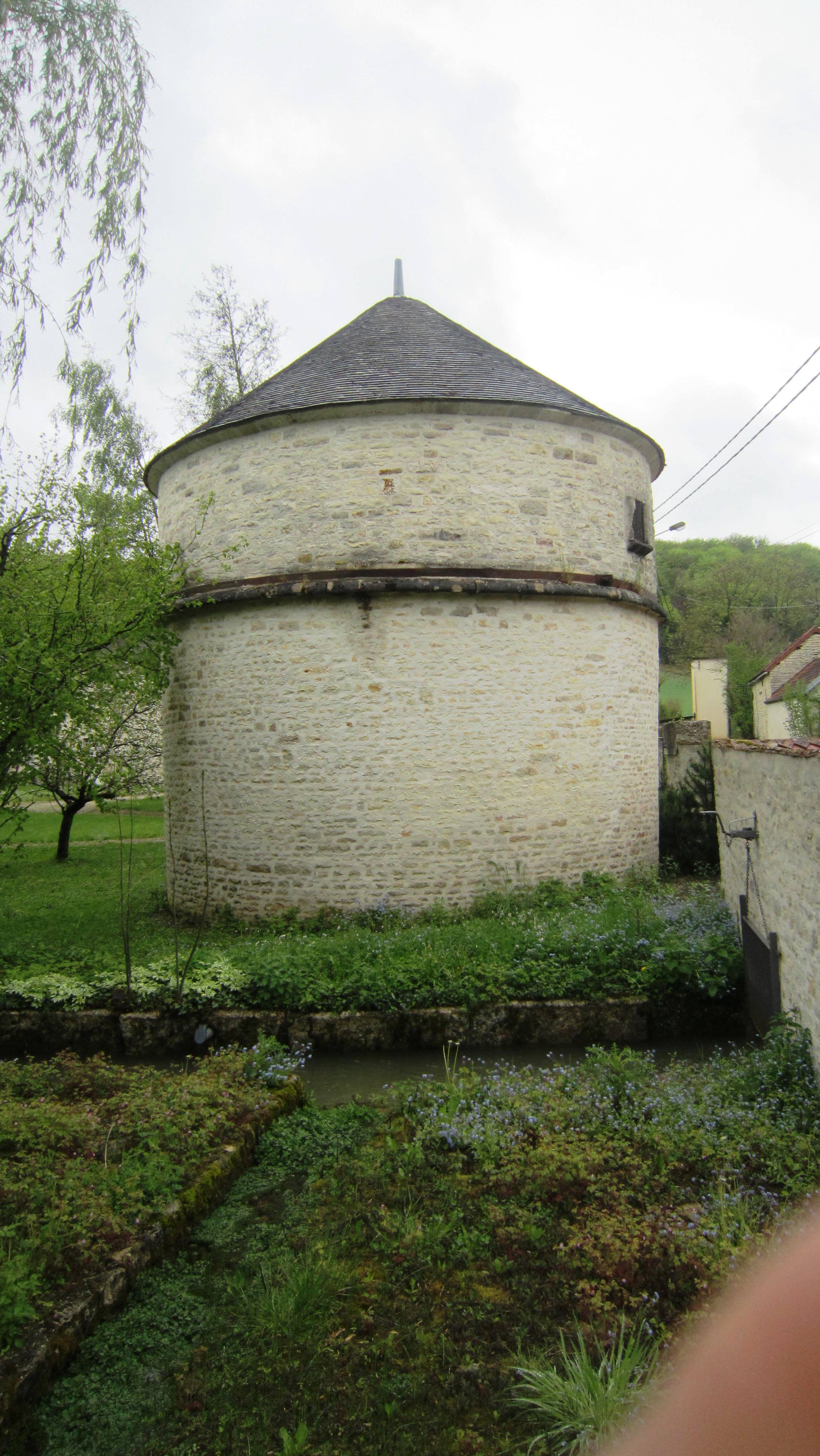 Pigeonnier à Chaumont-le-Bois (Côte-d'Or)